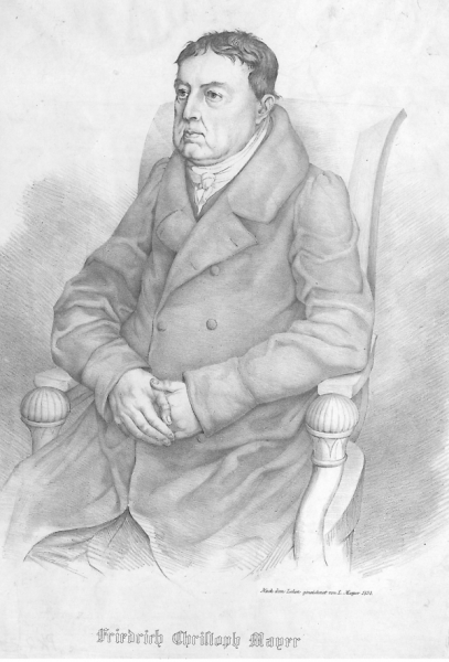 Porträt von Friedrich Christoph Mayer